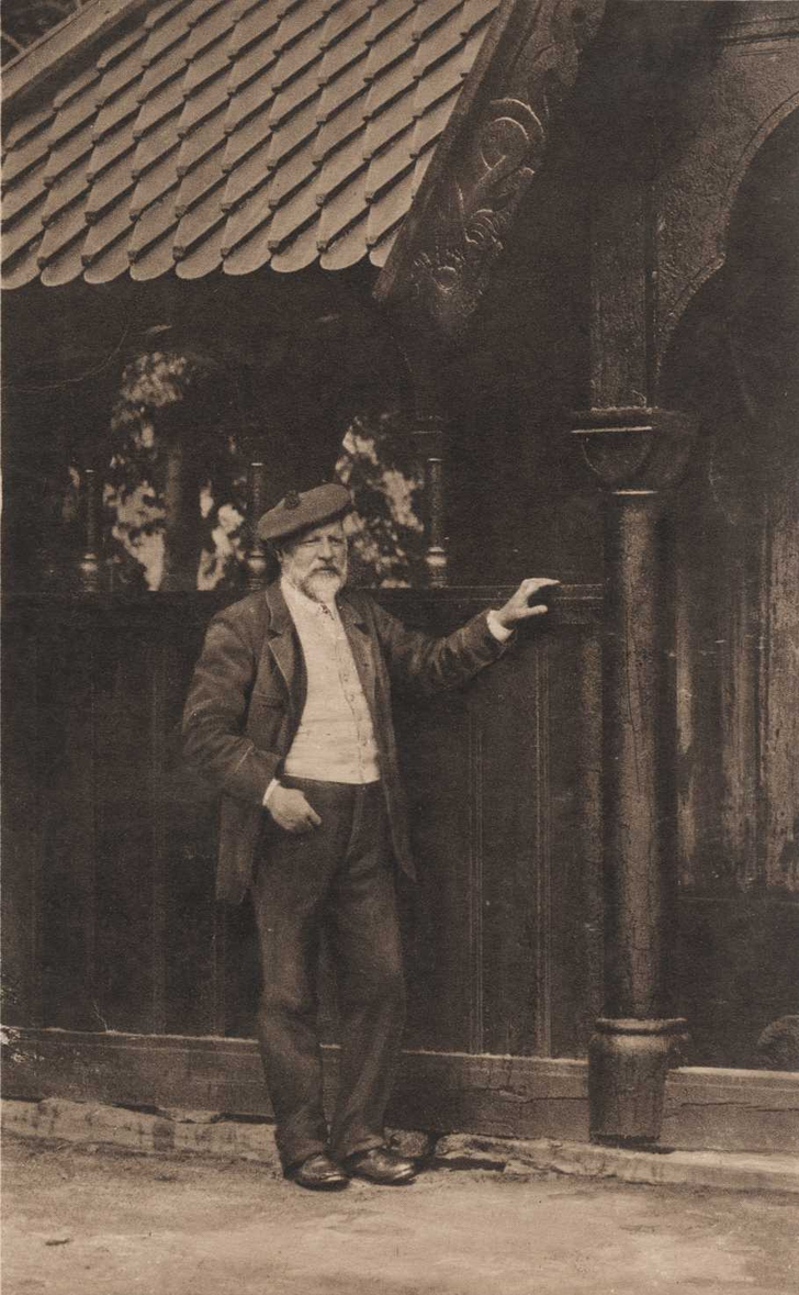 Peter Andreas Blix utenfor Hopperstad stavkirke, ca. 1905–10. Ukjent fotograf/Oslo Museum.